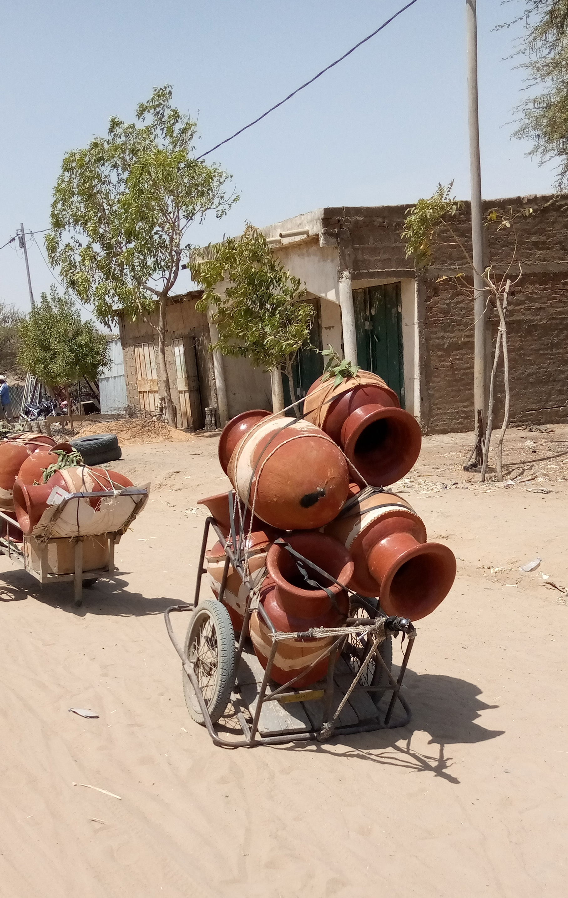 transport de canaris à N'Djaména. This is an image with the theme "Africa on the Move or Transport" from: Chad